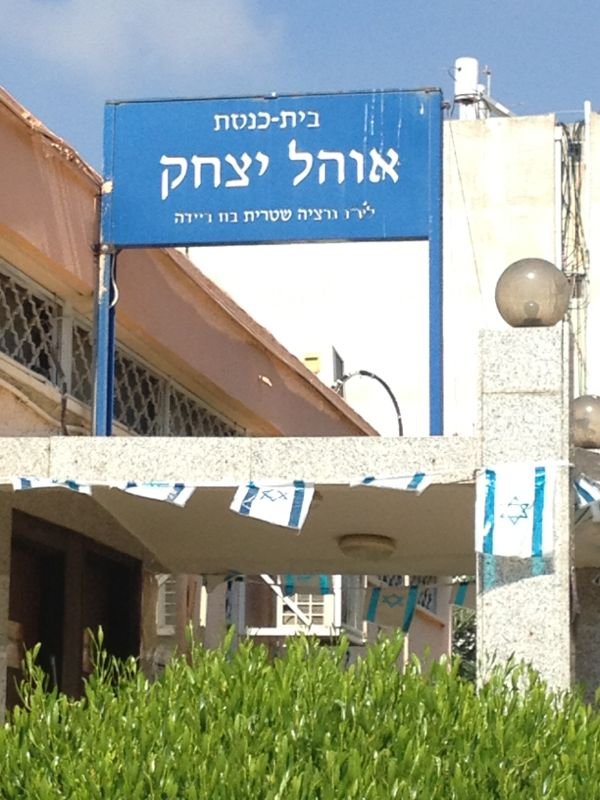 הכניסה לבית הכנסת אוהל יצחק בטירת הכרמל